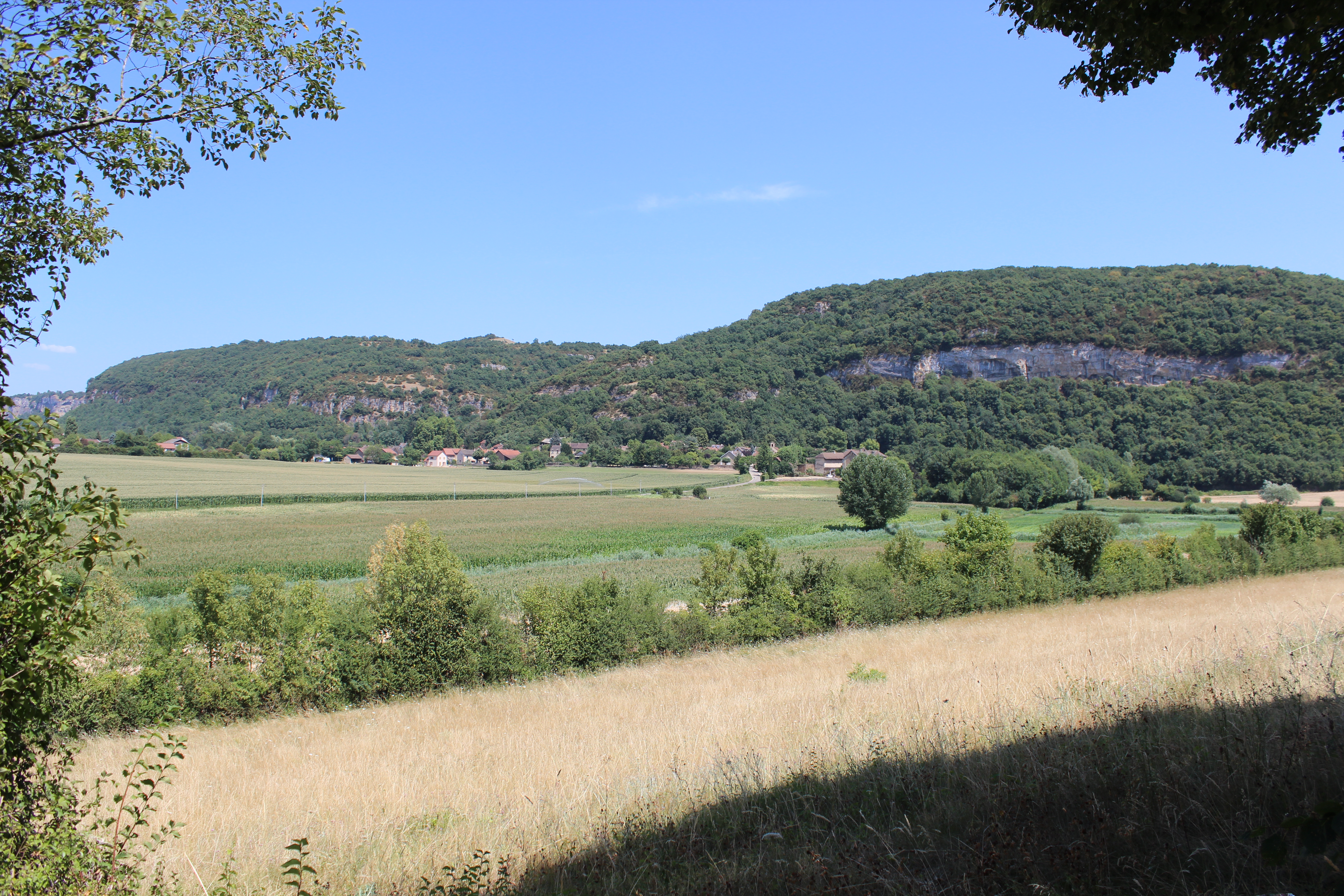 Vue sur le village de Verna (Isère).